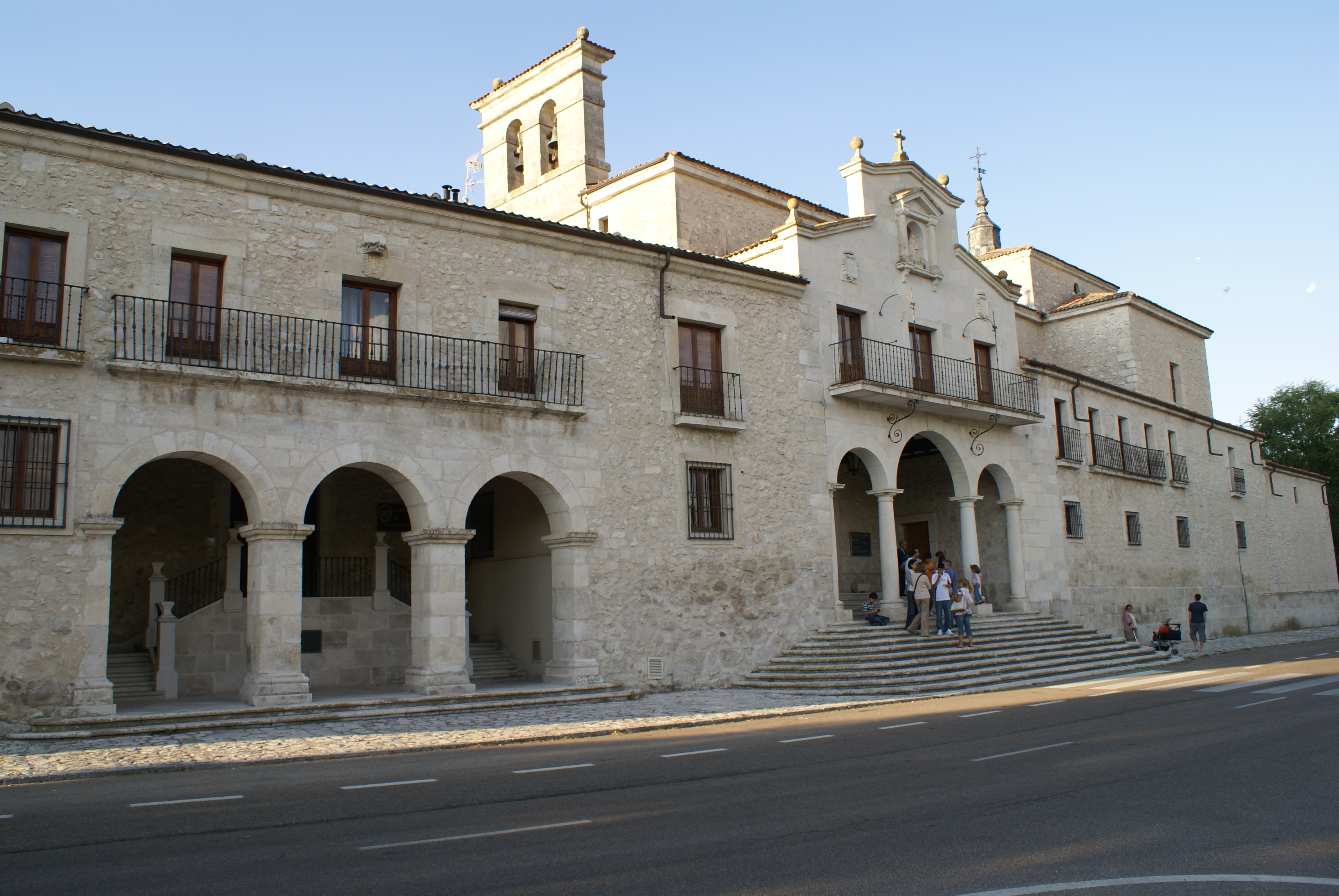 Exterior del Santuario de El Henar.